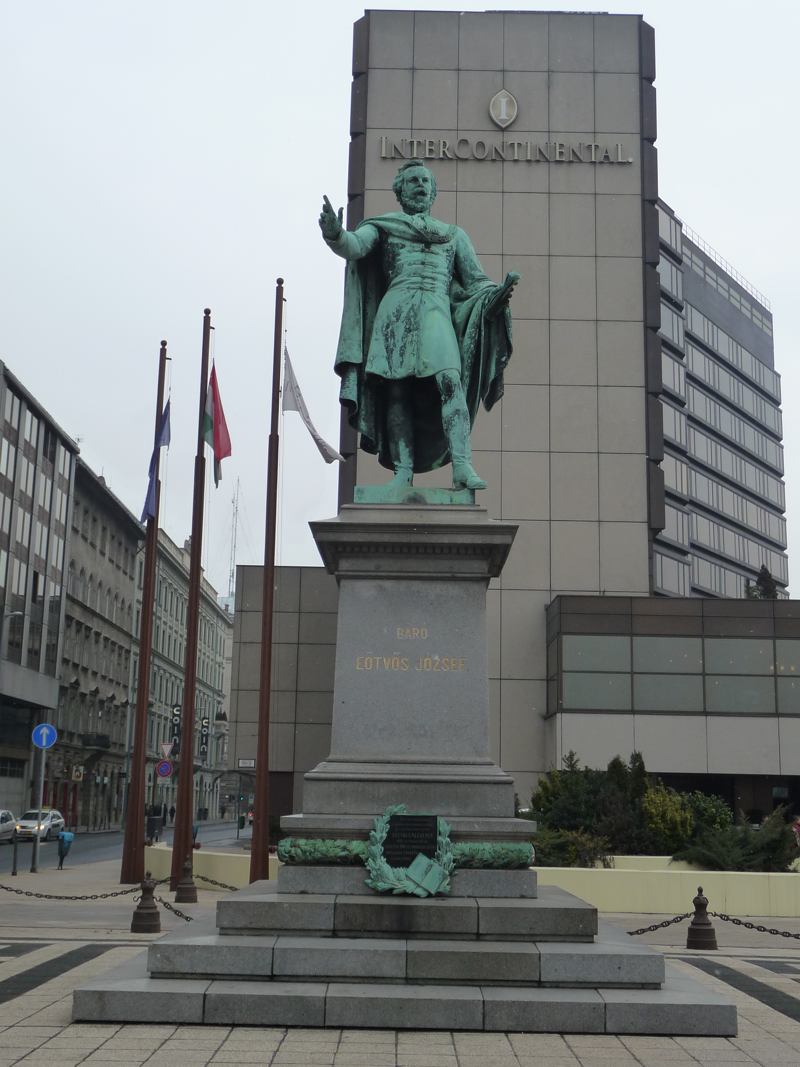 Huszár Adolf: Eötvös József (Roosevelt tér, Budapest)